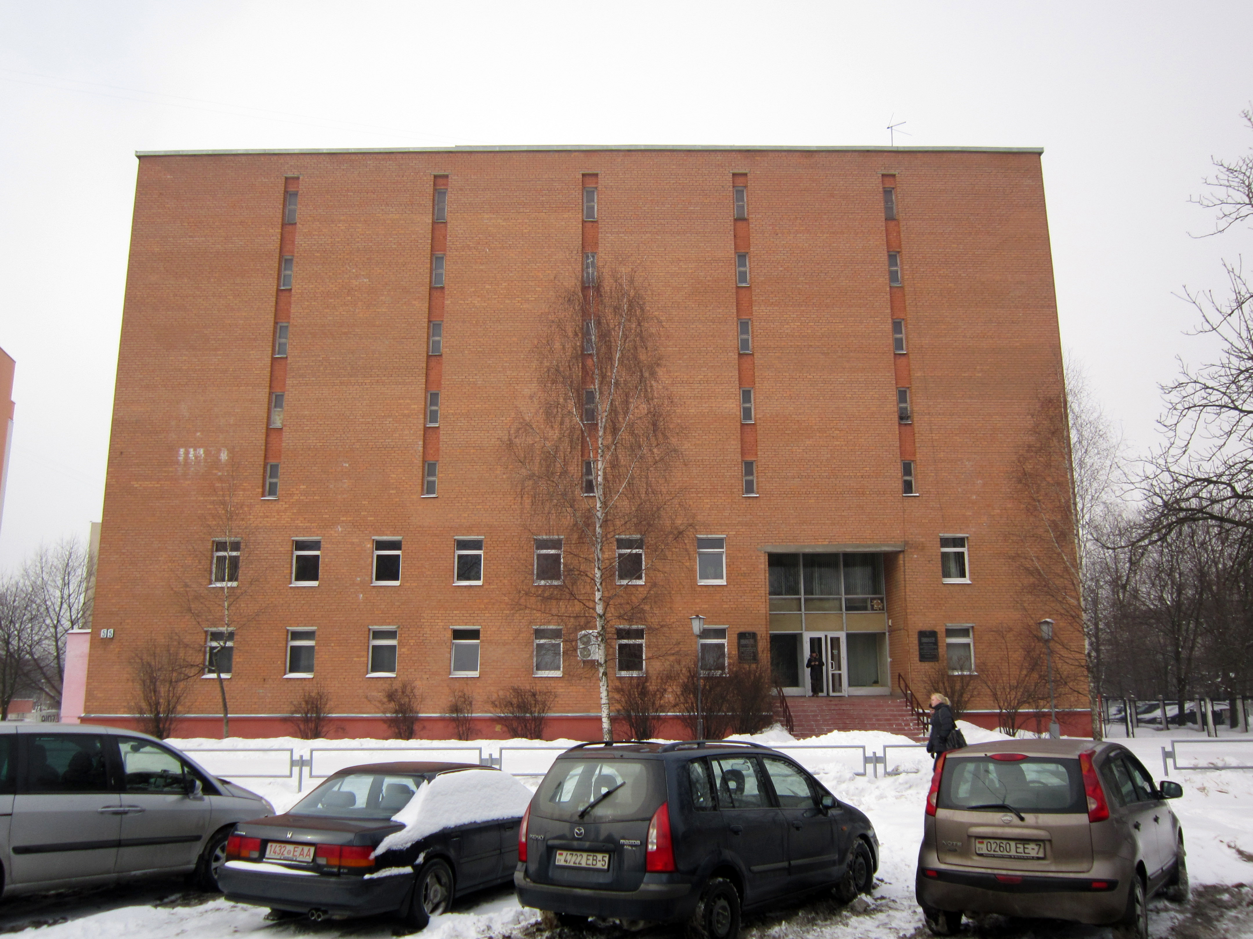 Национальный исторический архив Беларуси в Минске